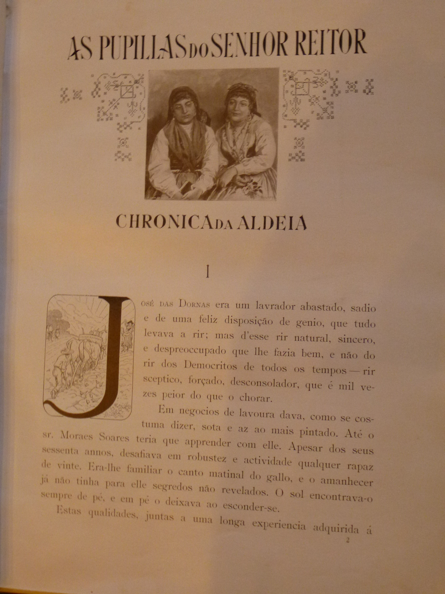 Prima pagina dell'edizione originale di As Pupilas do Senhor Reitor / First page of the original edition of As Pupilas do Senhor Reitor